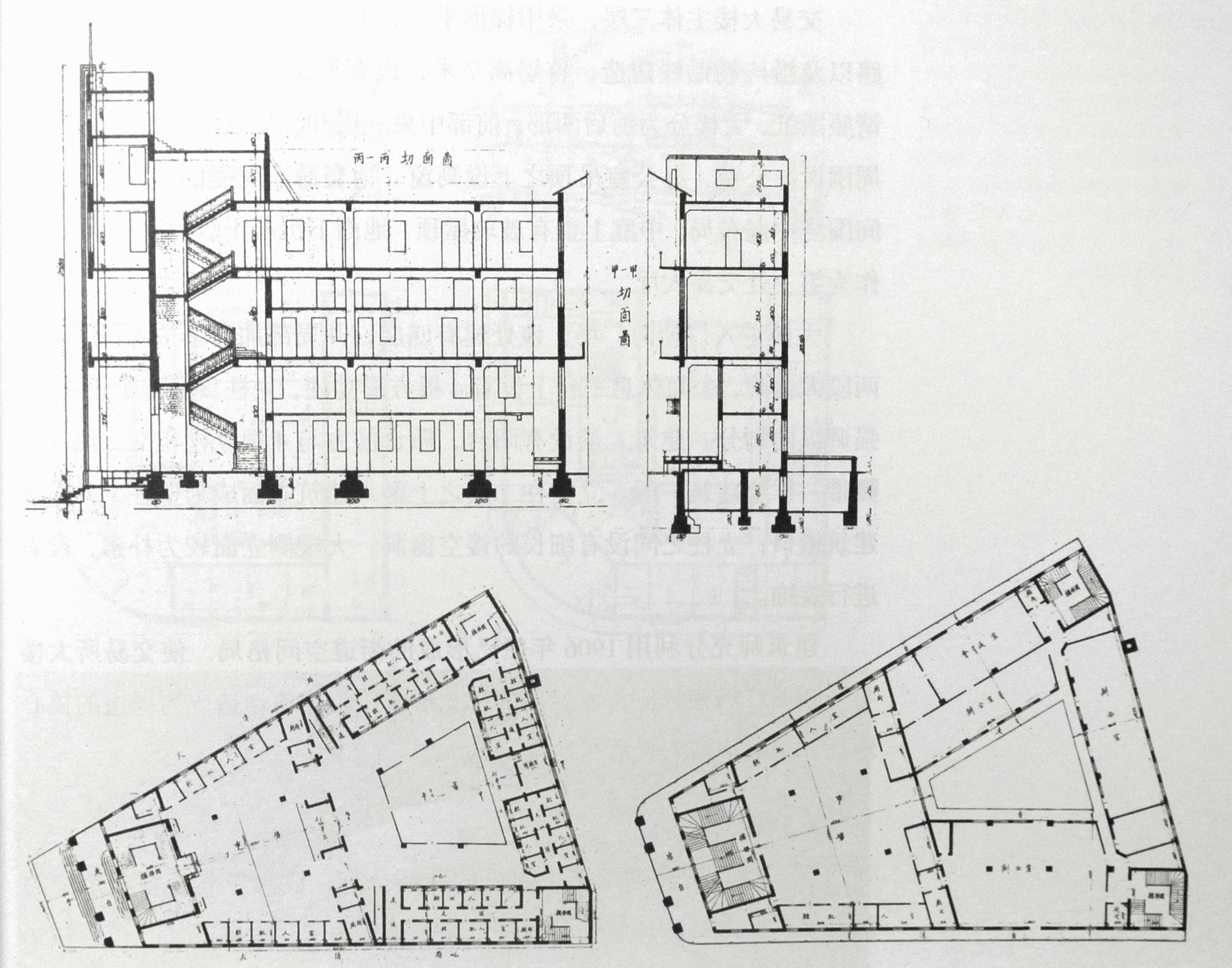 青岛市物品证券交易所设计图